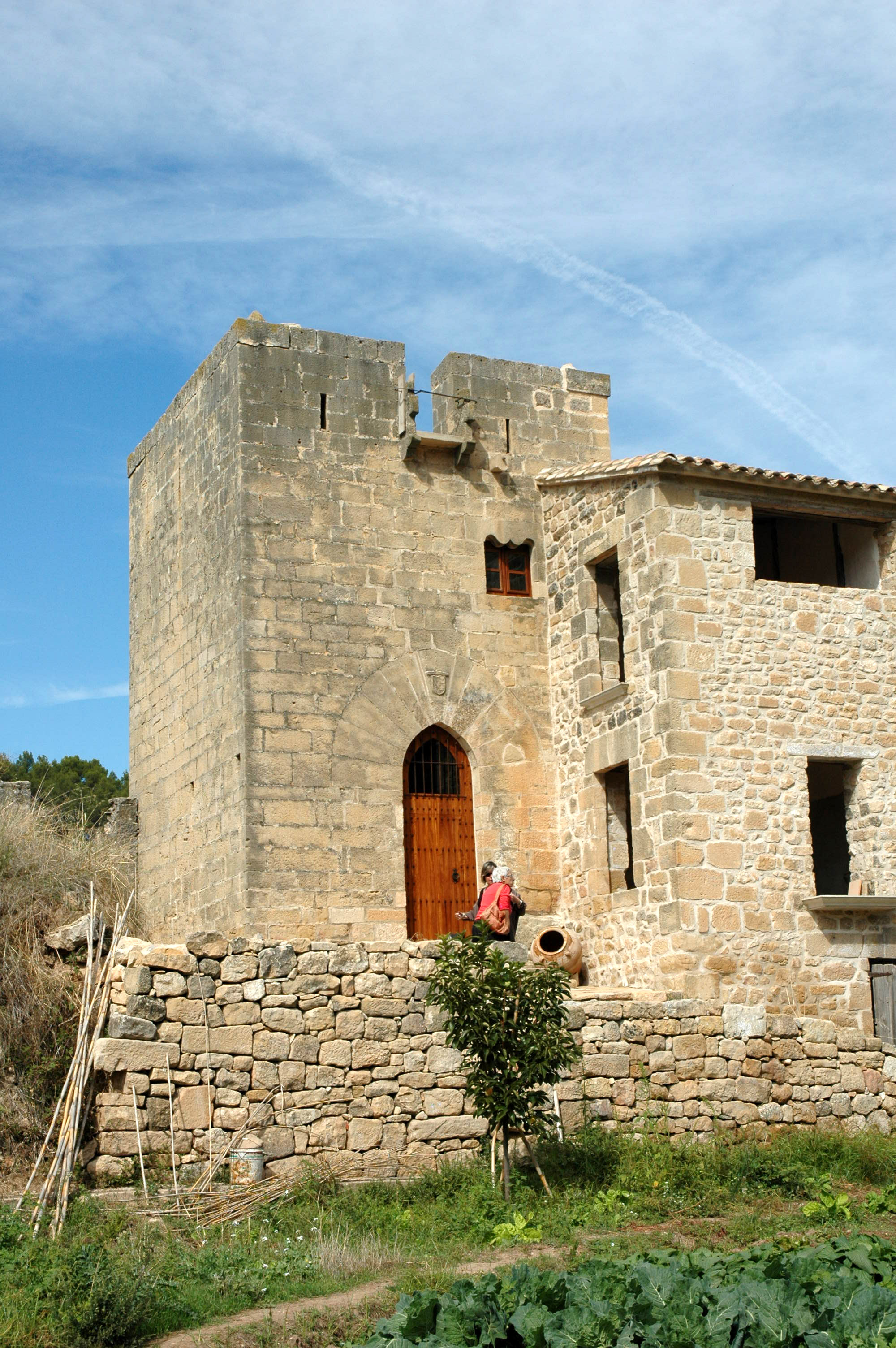 Horta de Sant Joan (Terra Alta). La Torre de l'Olivar. Fot. 1998.